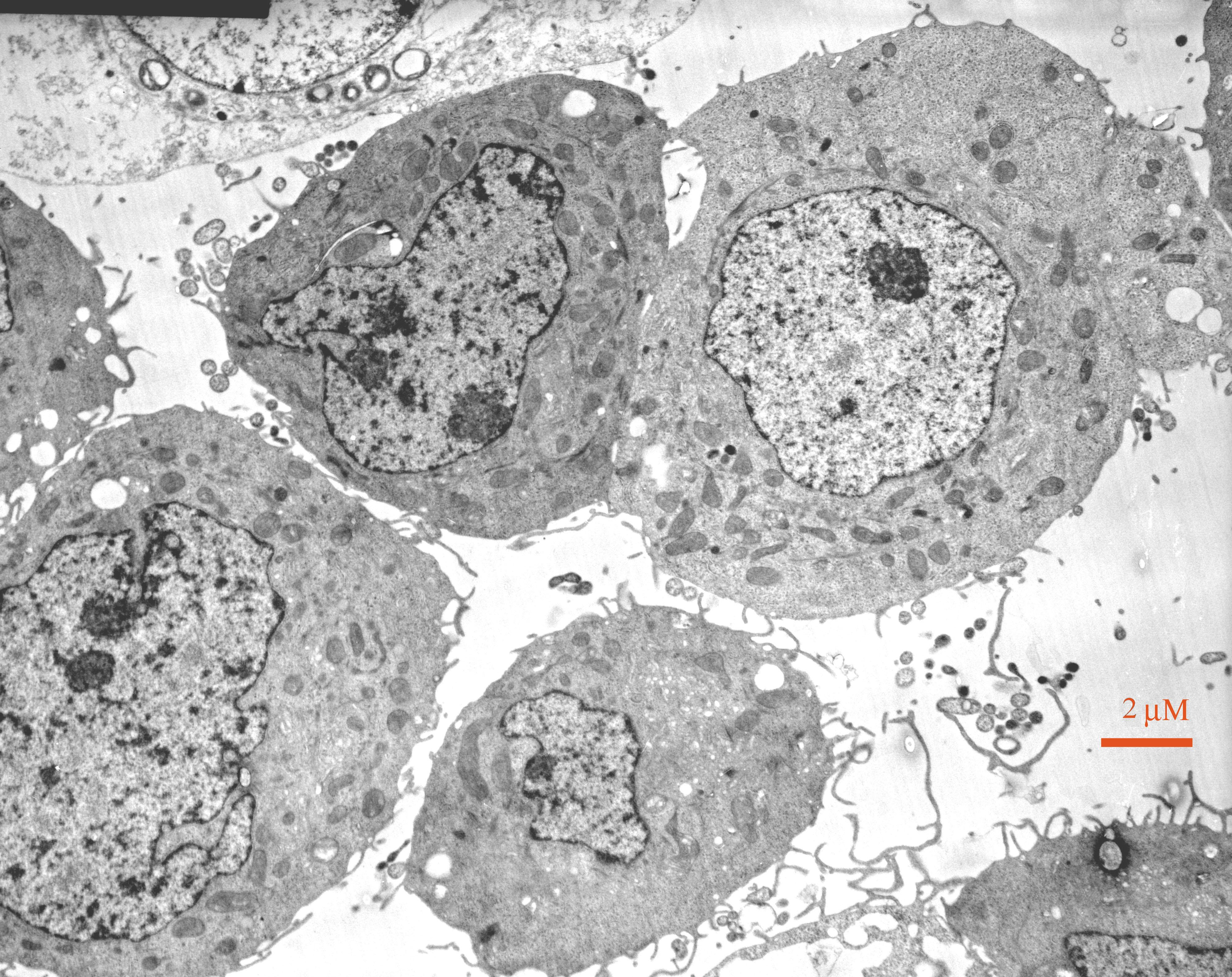 צילום במקרוסקופ אלקטרוני חודר של תאי סרטן השד מתוך שורת תאים.